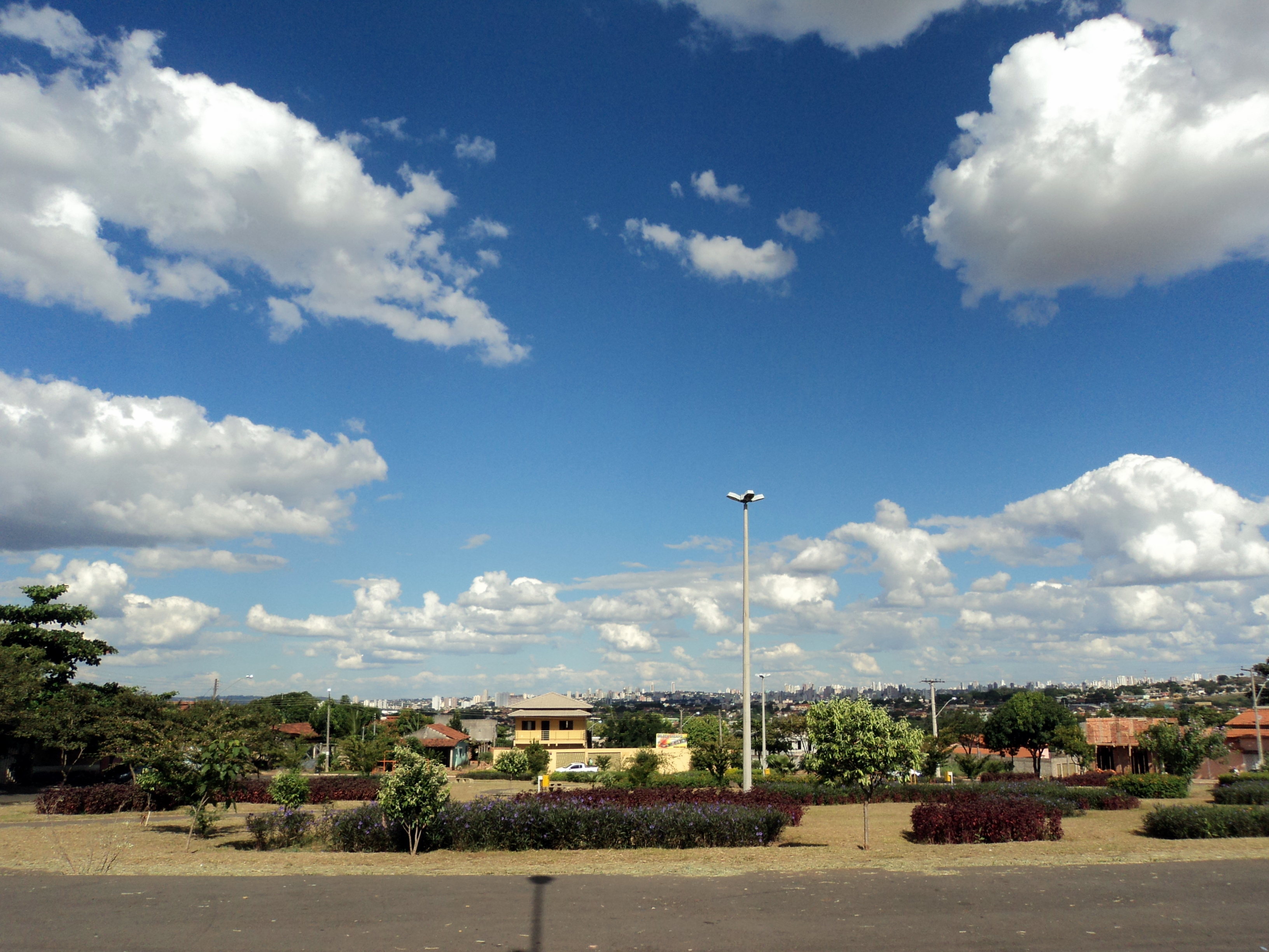 Praça no Bairro Parque das Flores - Goiânia - GO